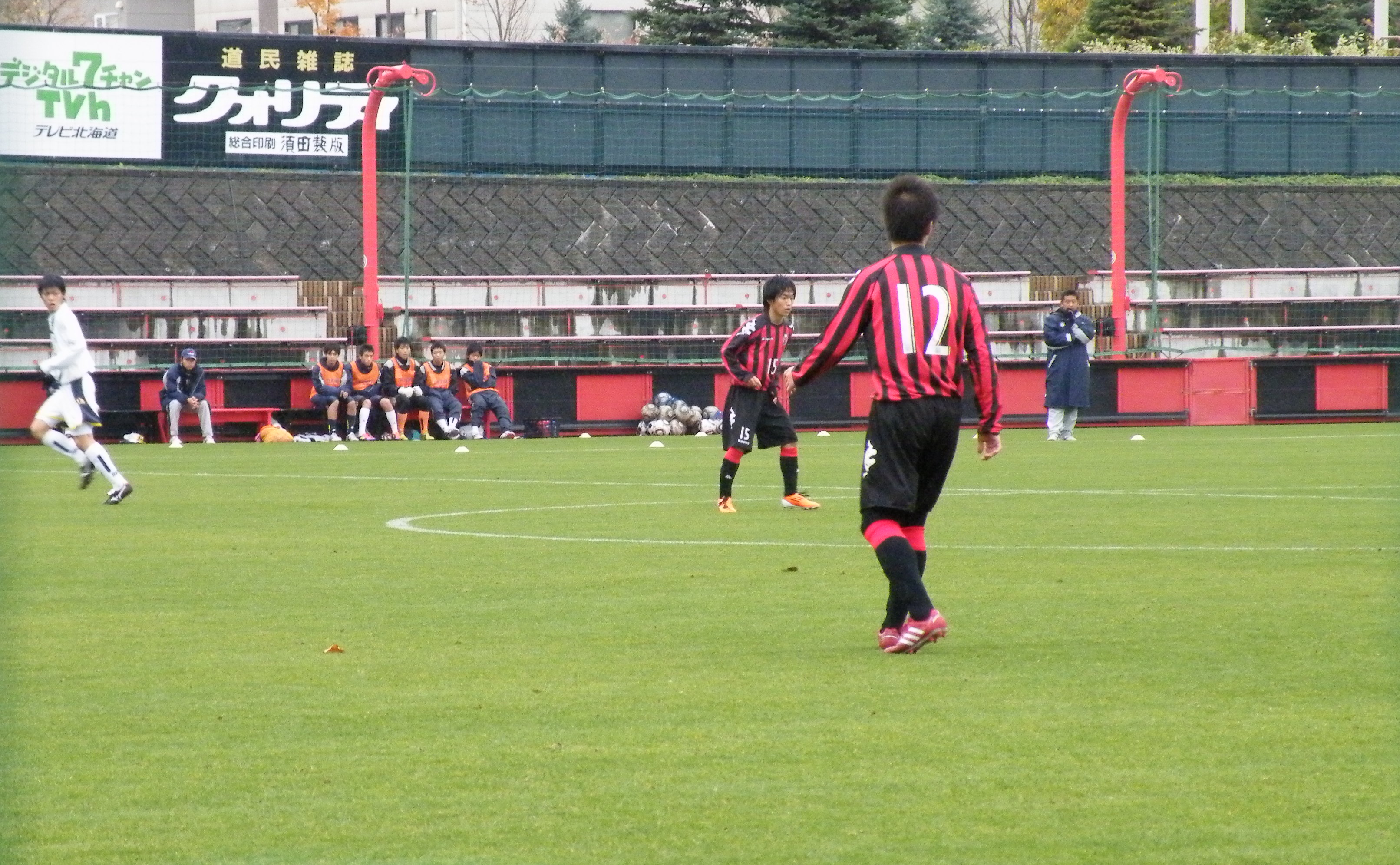 第19回Jリーグユース選手権大会グループリーグ Cグループ第3節 コンサドーレ札幌U-18対ザスパ草津U-18 の試合の様子。札幌市西区、宮の沢白い恋人サッカー場。2011年11月05日。